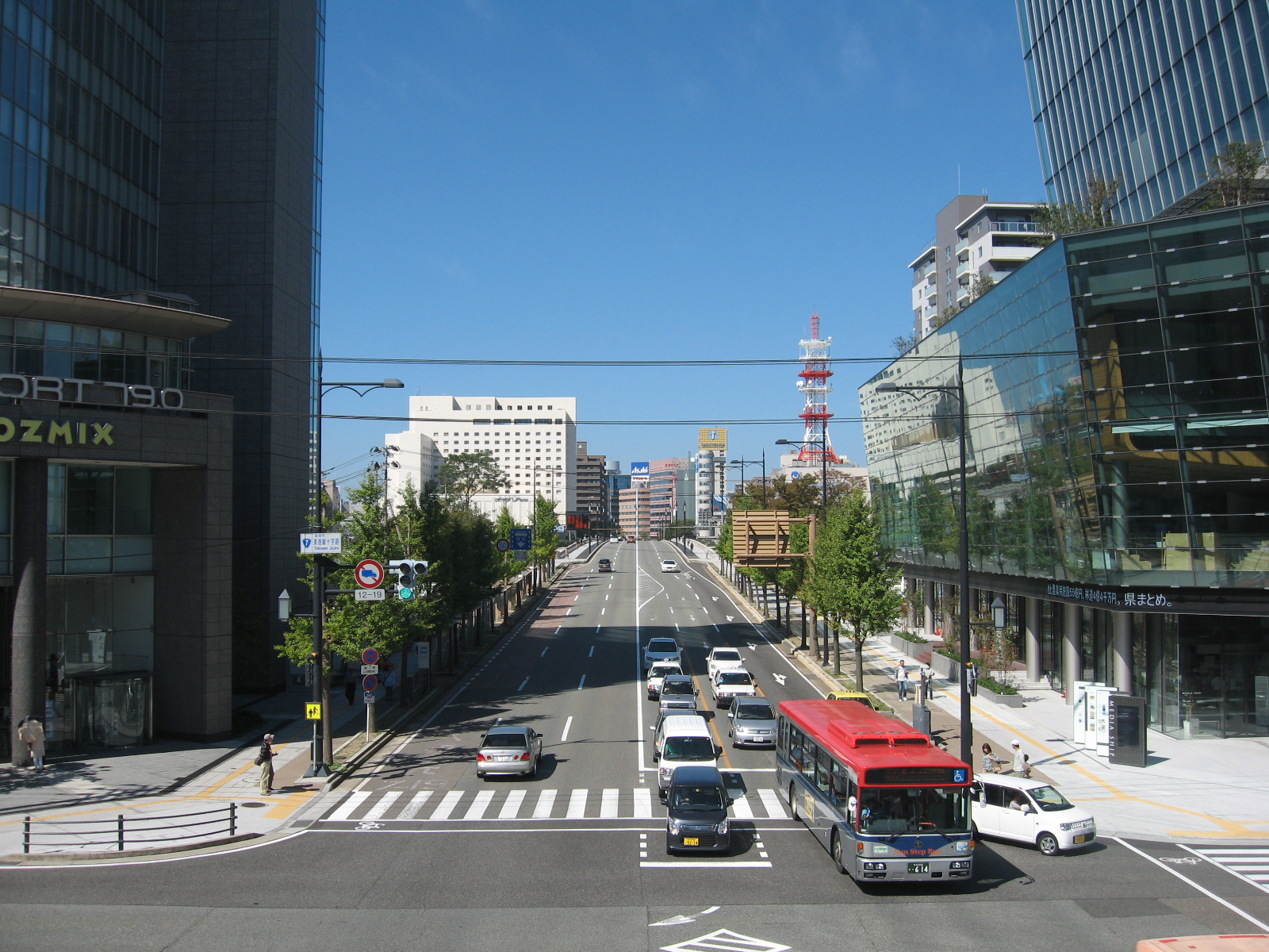 東港線十字路歩道橋から見た萬代橋。